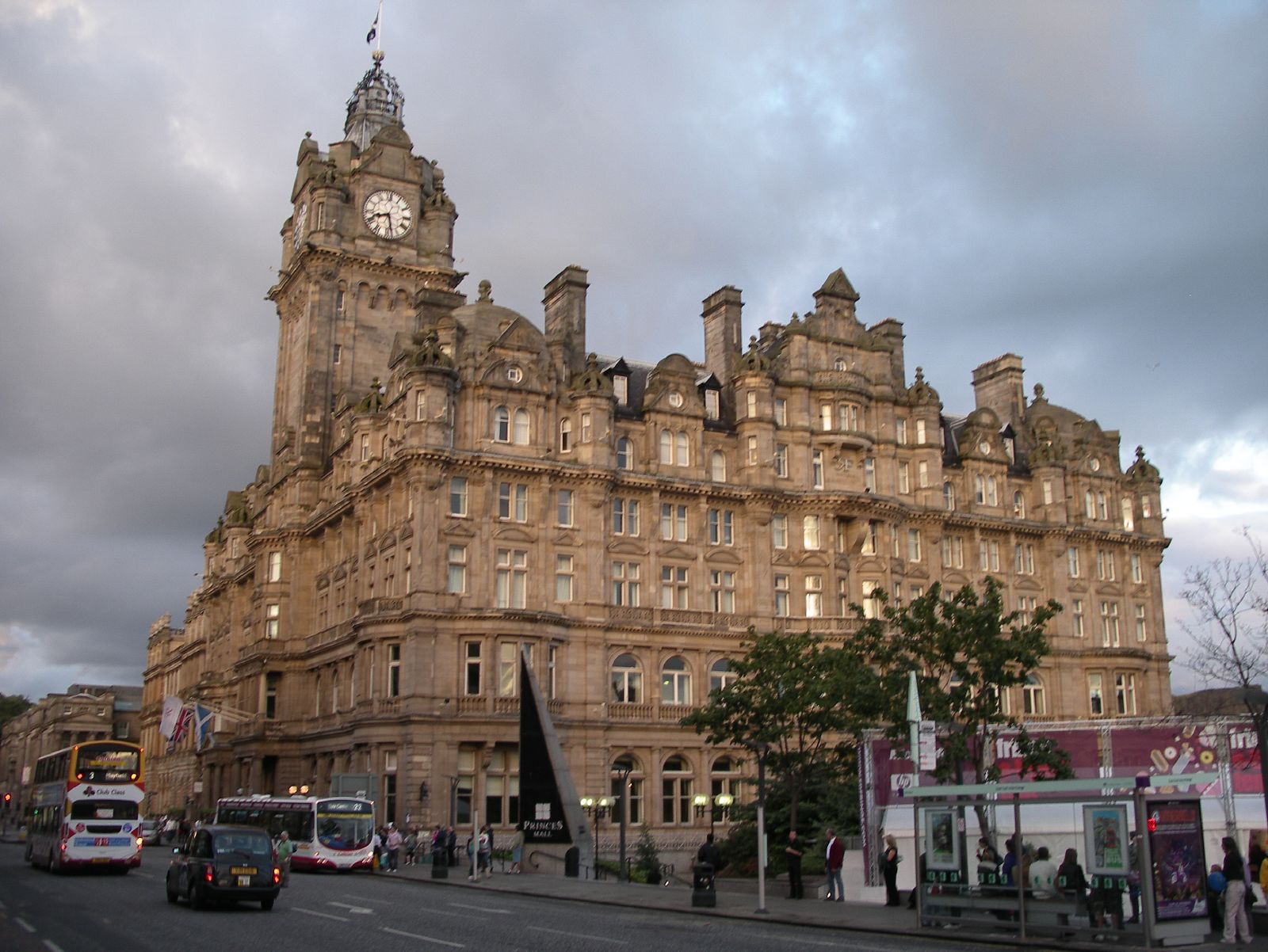 Edinburgh 06